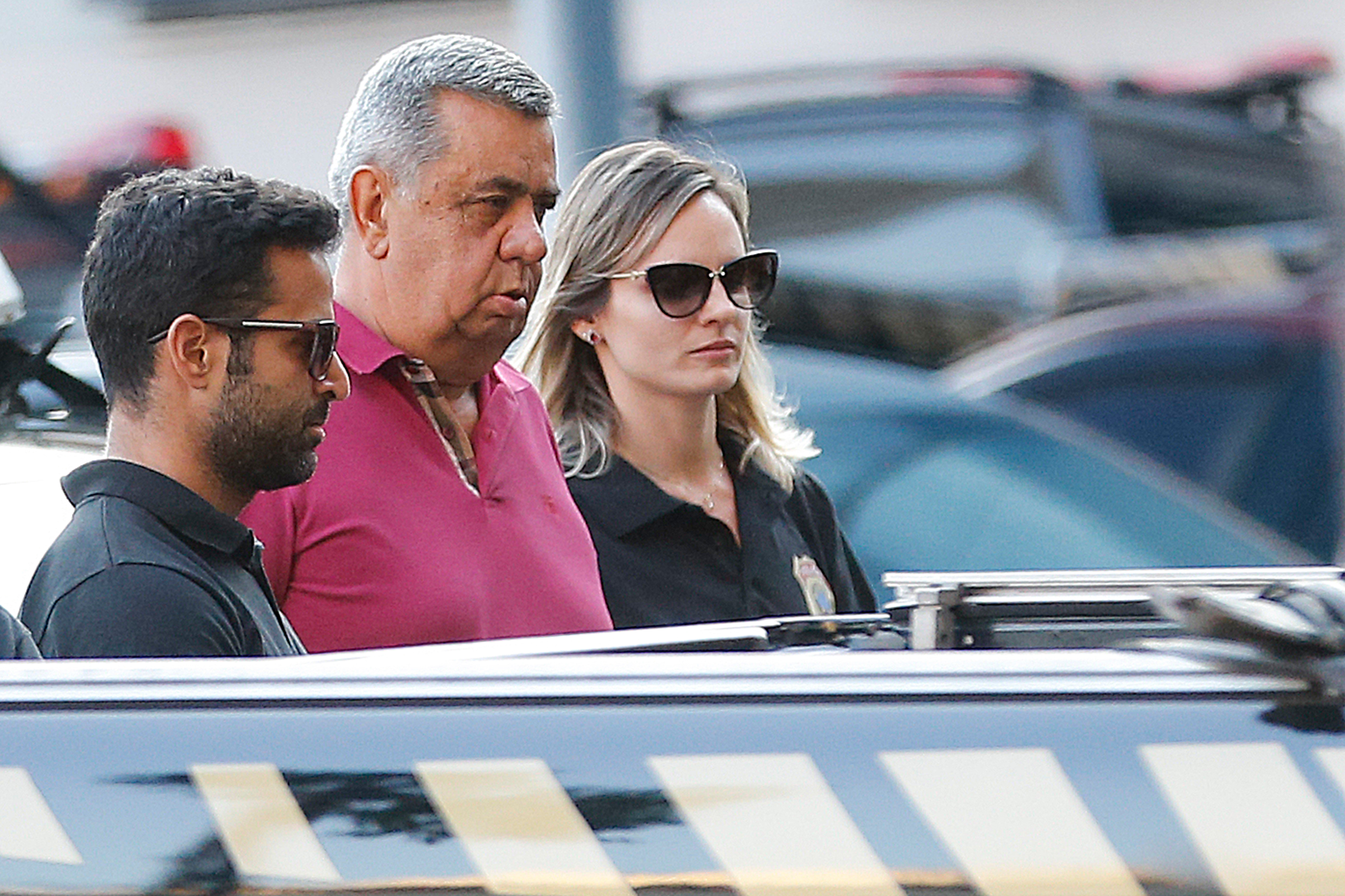 Rio de Janeiro - O presidente da Alerj, deputado Jorge Picciani, se entrega à Polícia Federal após ter prisão decretada pelo TRF (Fernando Frazão/Agência Brasil)